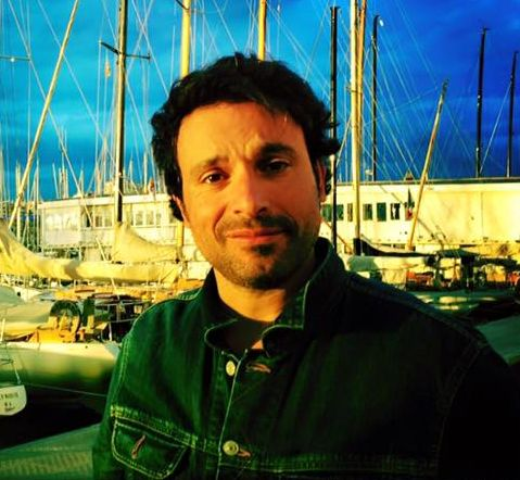 Bruno Salomone sur le Vieux Port de Marseille en 2016